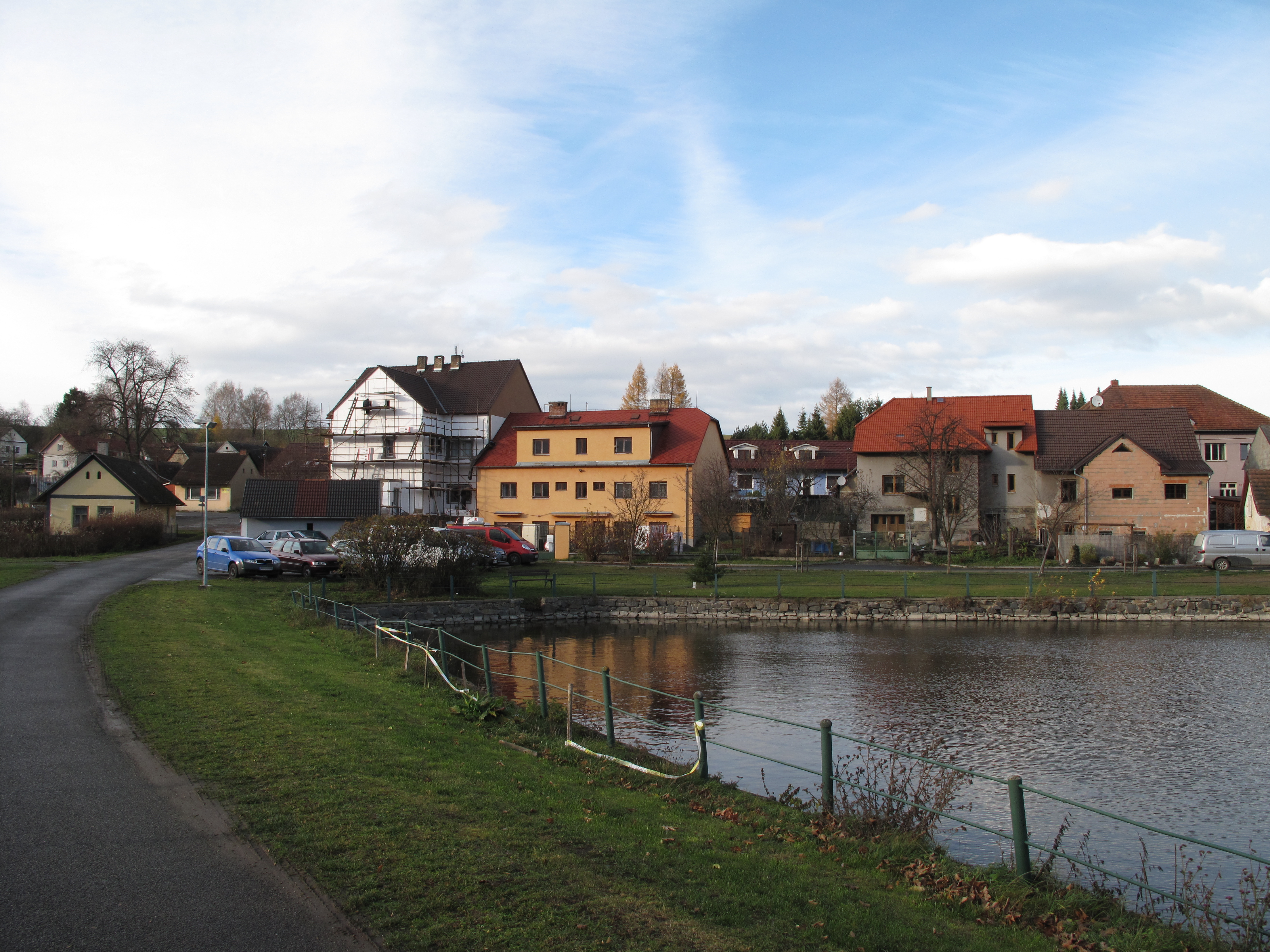 Rybník ve Střezimíři. Okres Benešov, Česká republika.